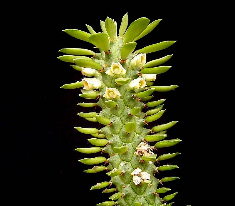 Euphorbia schubei